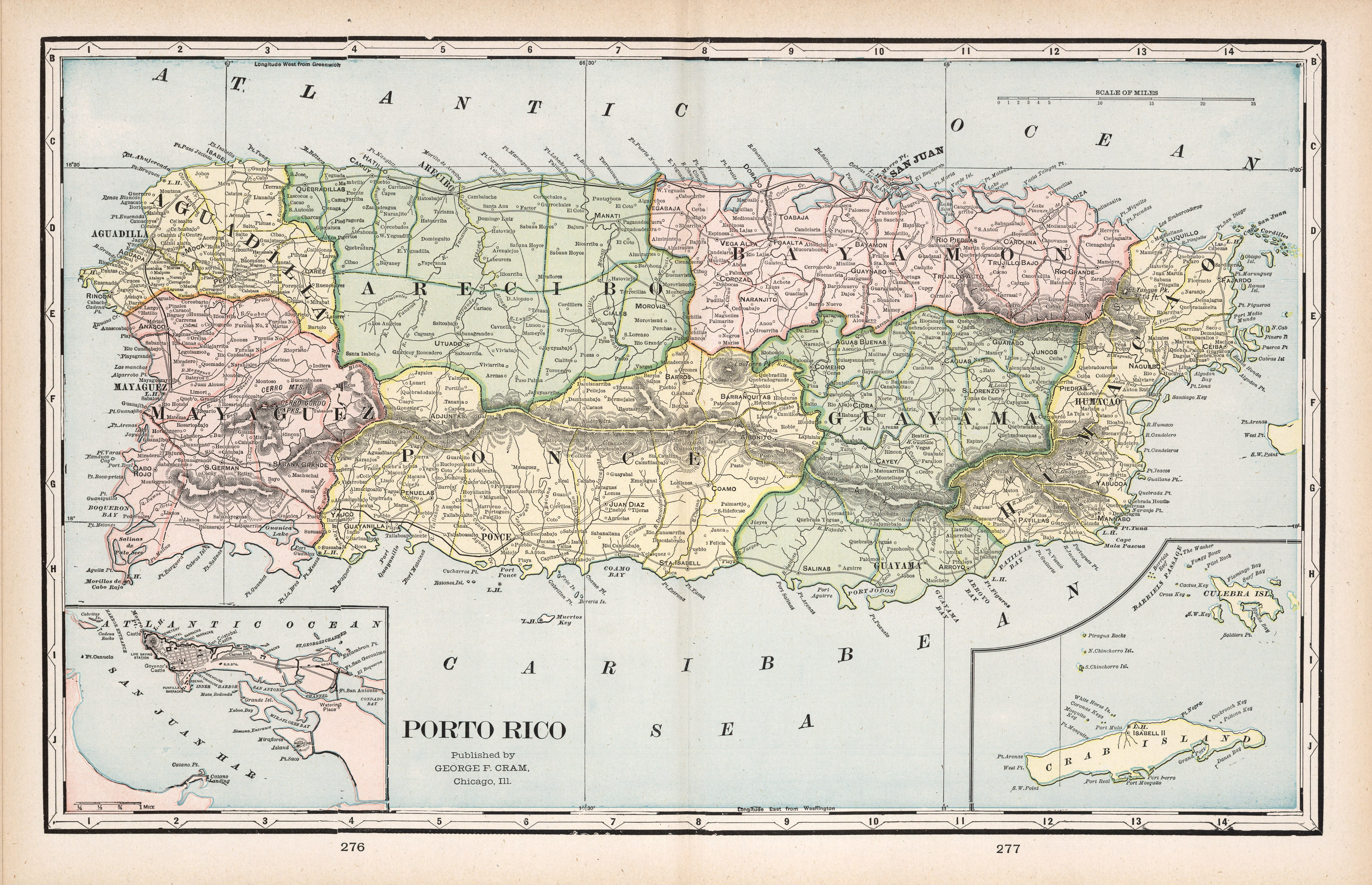 Map of Puerto Rico 1901, by administrative subdivisions under the USA